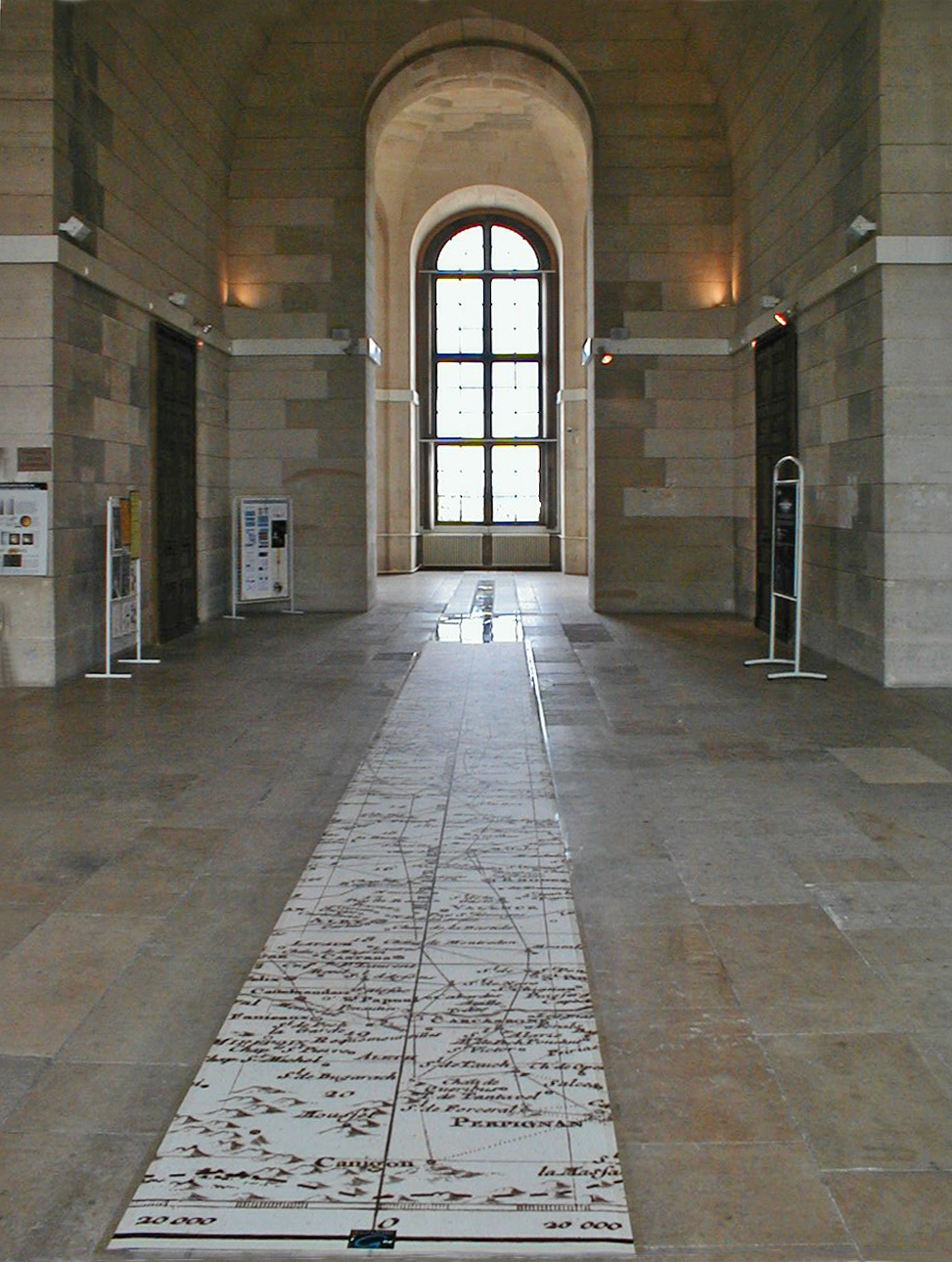 Salle Méridienne (dite salle Cassini), Observatoire de Paris, XIVe arrondissement